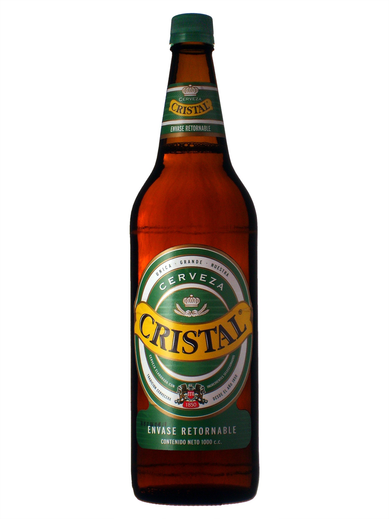 Envase de Cerveza Cristal, producida en Chile por la Compañía de Cervecerías Unidas (CCU).